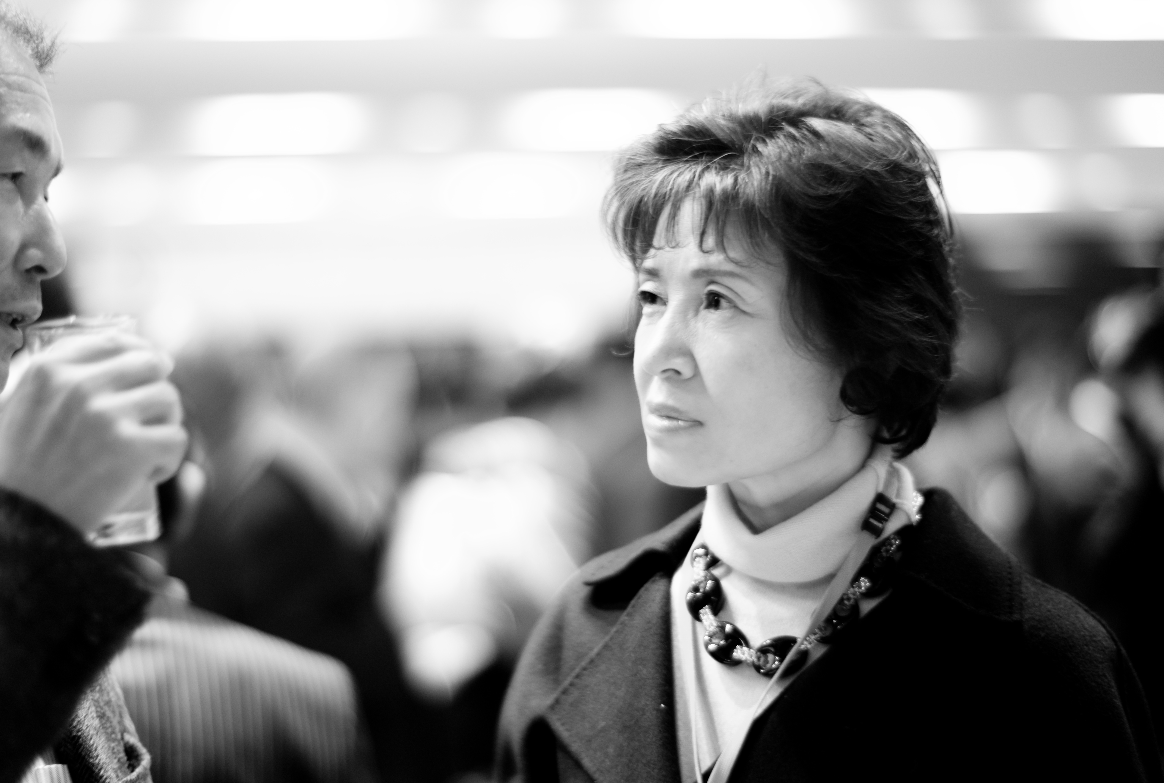 2007年11月16日、新潟県にて.